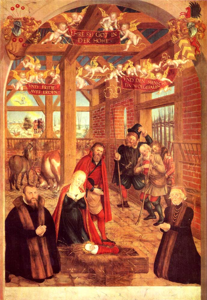 das Weihnachtsepitaph für Casper Niemegk